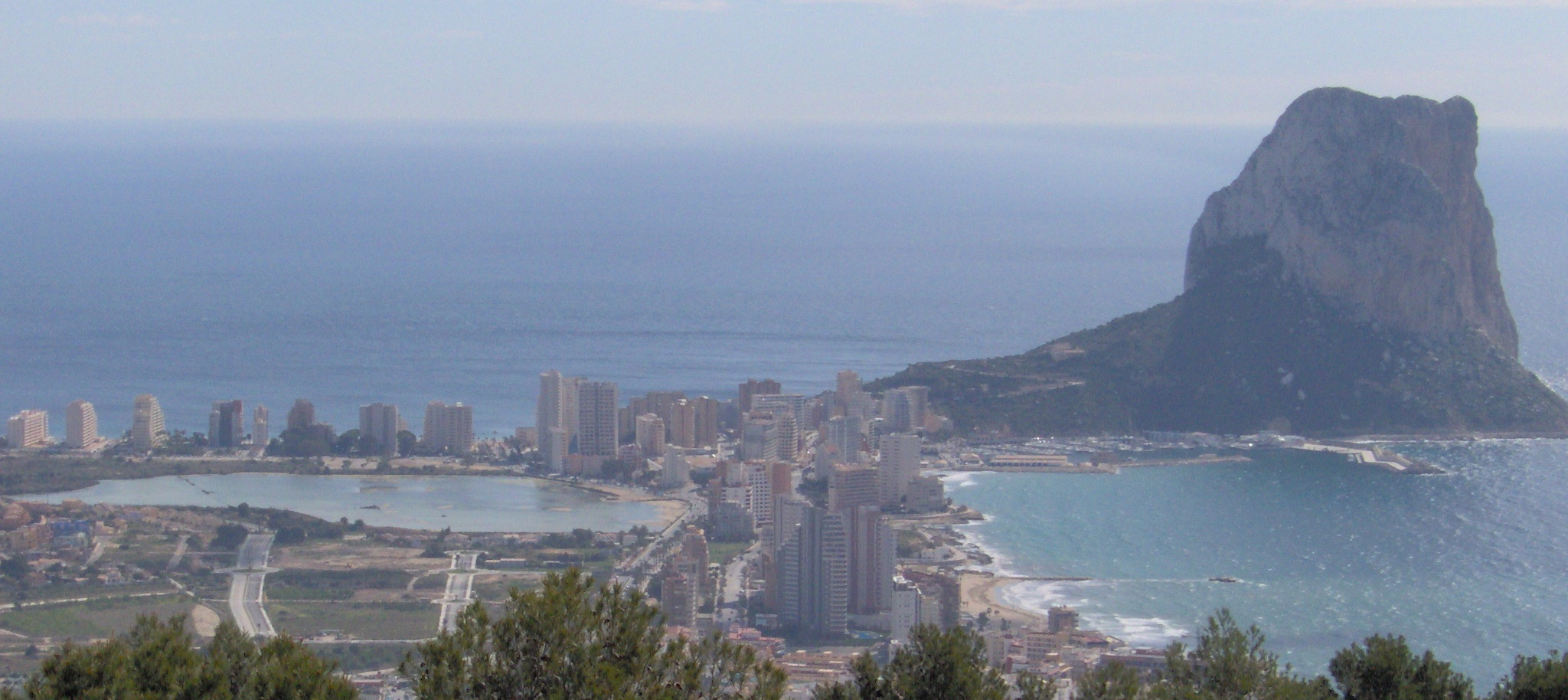 Calpe (Spanien) - Peñon de Ifach und der SalzseeFoto auf dem Oltaberg aufgenommen